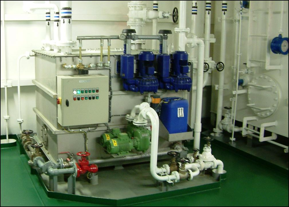 Blick auf eine Abwasseranlage im Maschinenraum eines modernen Containerschiffes (Foto: Ursula Horn)